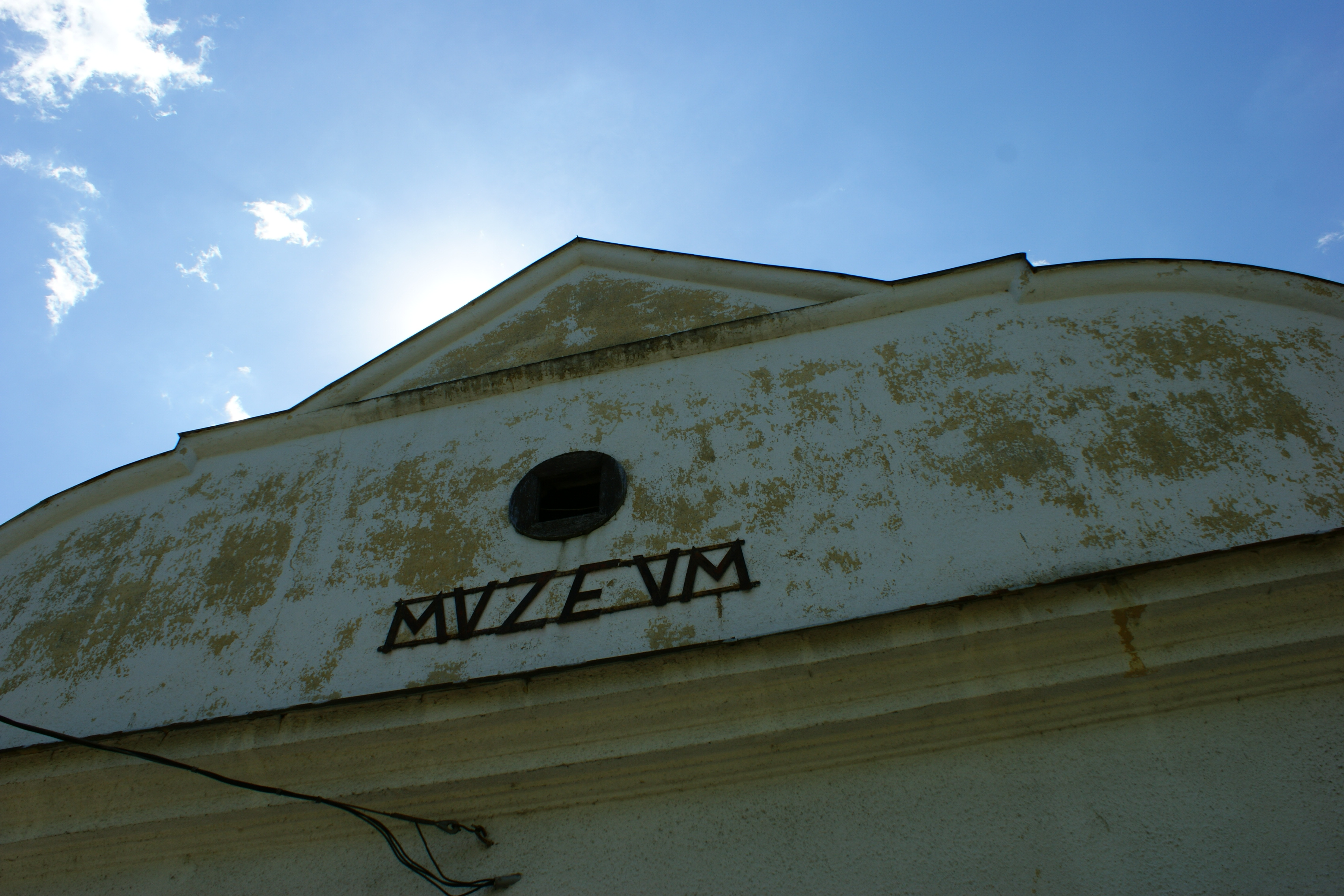 József Attila Múzeum, Balatonszárszó